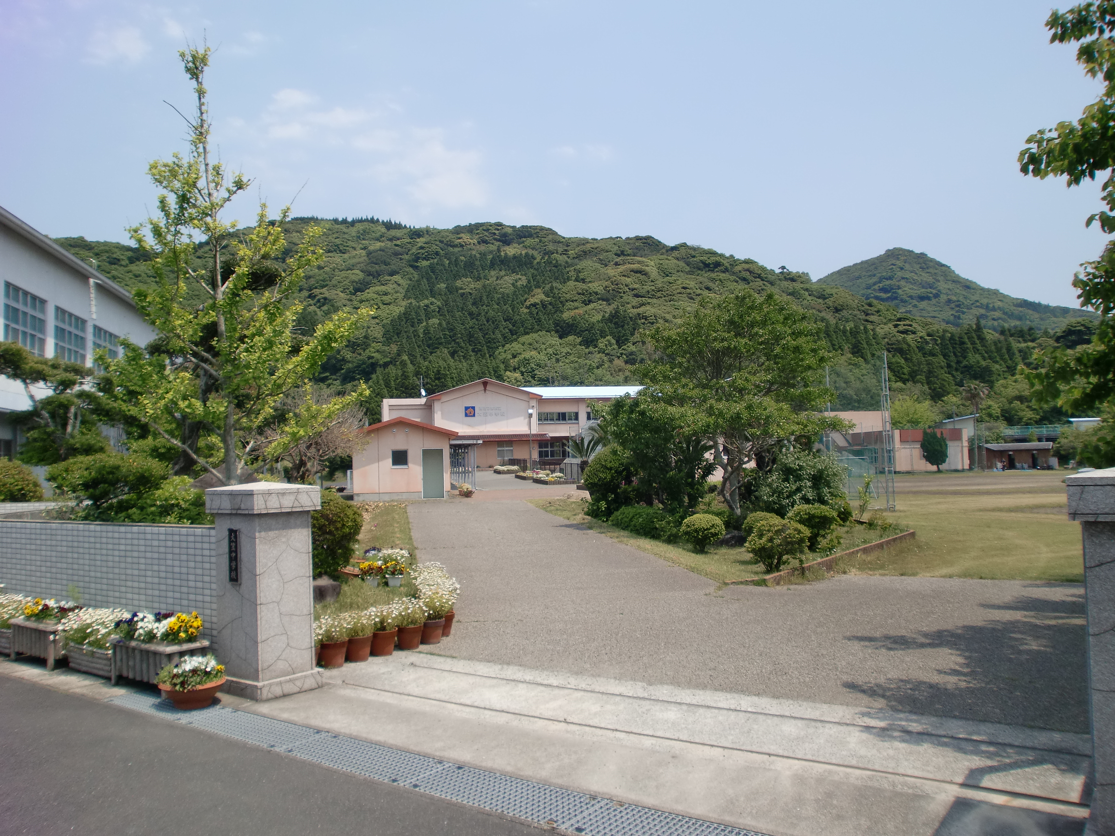 南さつま市立大笠中学校（旧・南さつま市立大浦中学校）の外観。